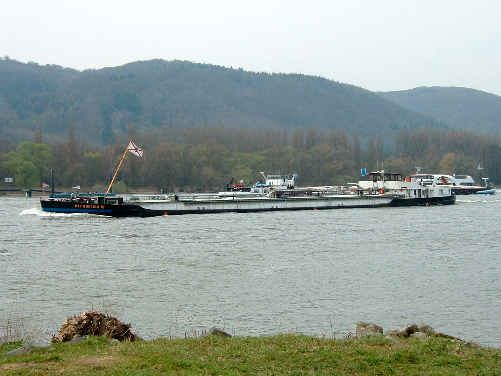 Bitumentankschiff